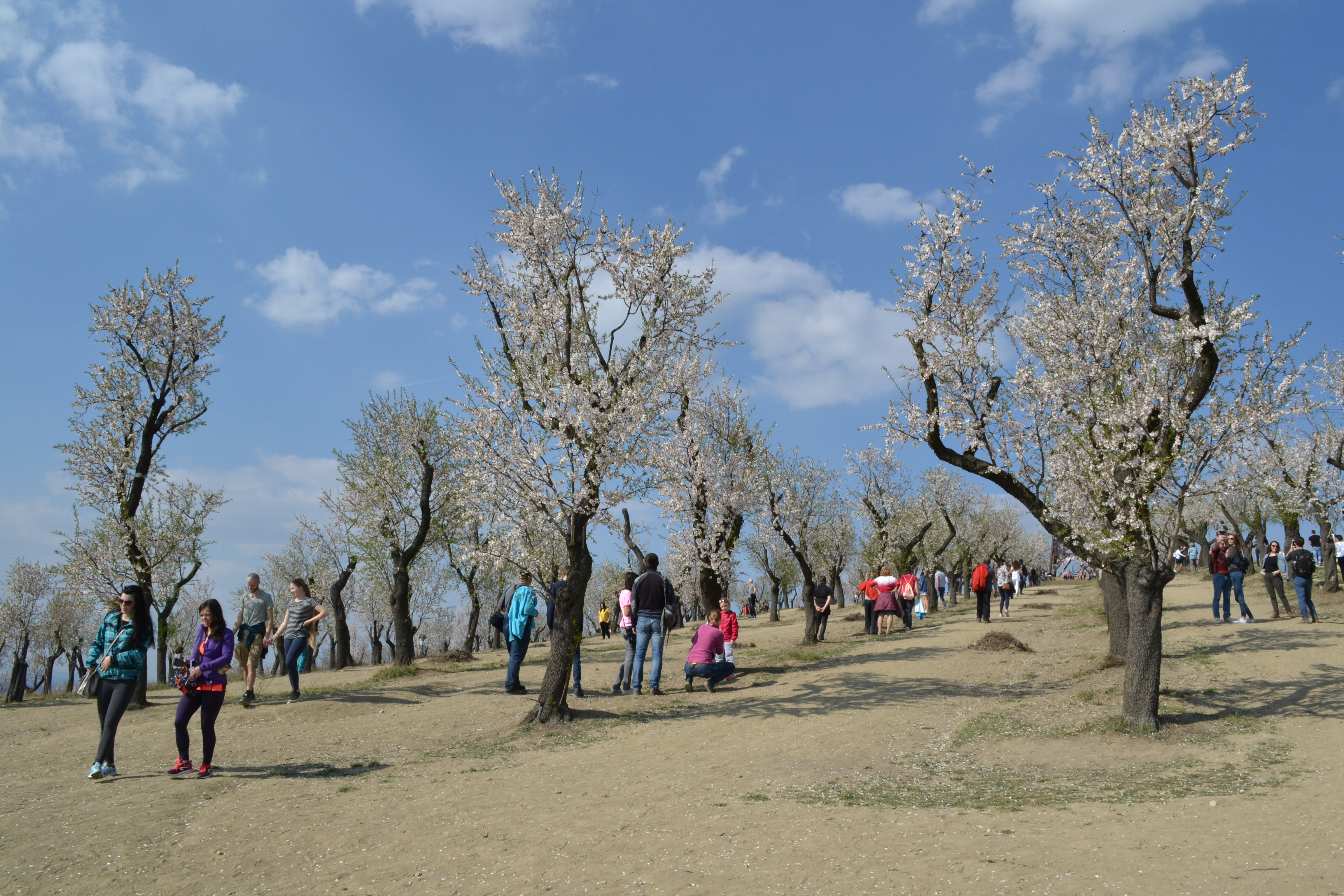 Slavnosti mandloní a vína Hustopeče 2019 v mandloňovém sadu.